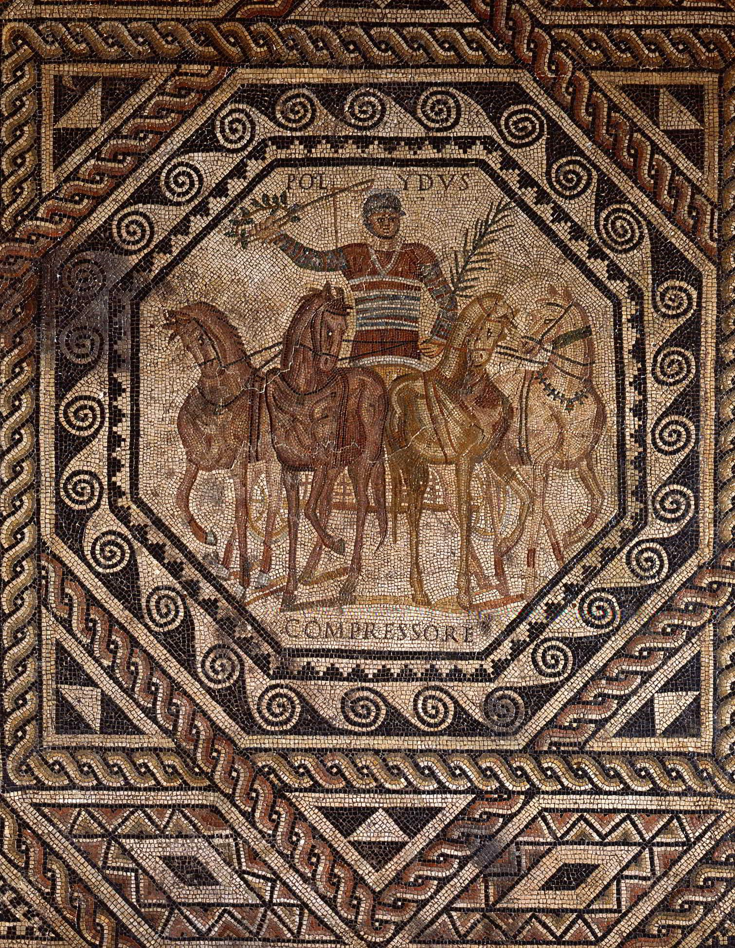 Mosaikboden mit dem Rennfahrer „Polydus“. Trier, Kaiserthermen, Mitte des 3. Jahrhundert n. Chr.